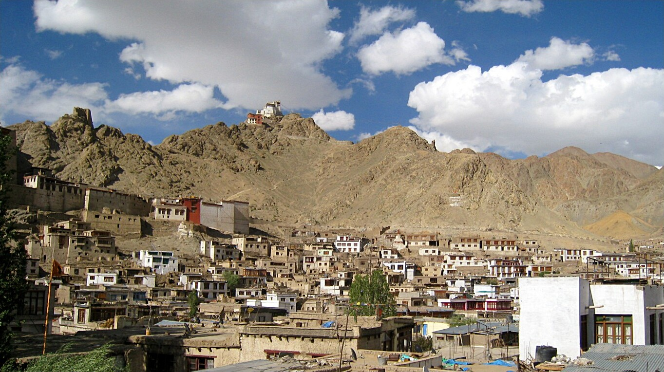 Leh in Summer